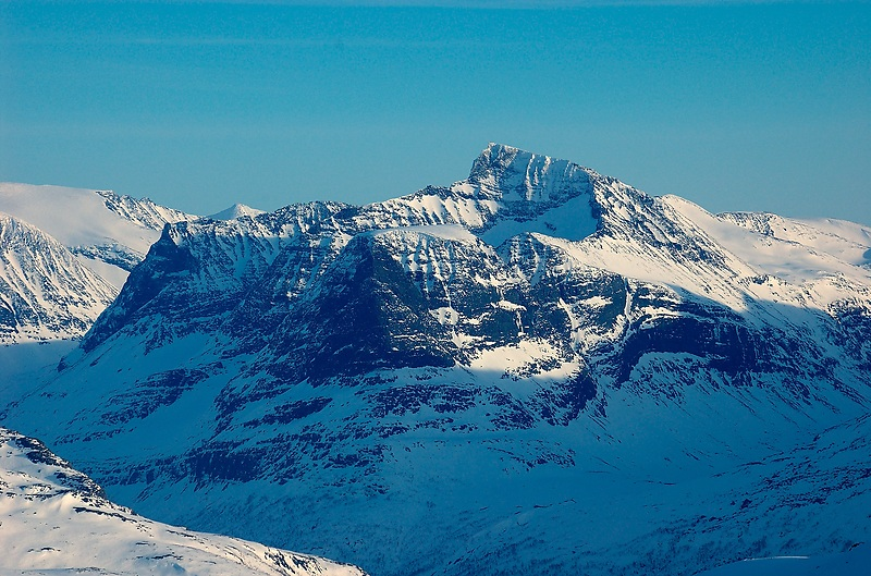 Såtbakkollen seen from Vassnebba, Trollheimen, Norway